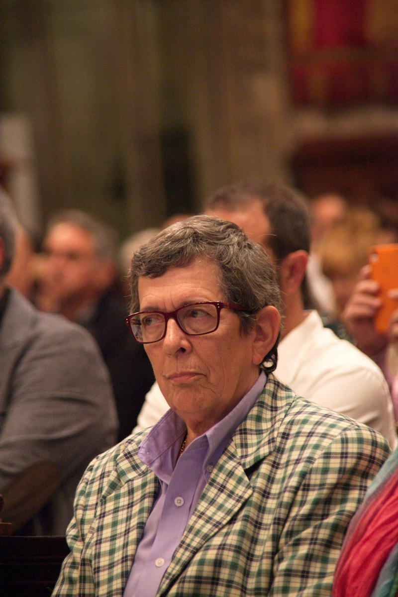 Eulalia Vintro a l'Acte de lliurament a Neus Català de la medalla d'Or al Mèrit Cívic de l'Ajuntament de Barcelona. 29-10-2014